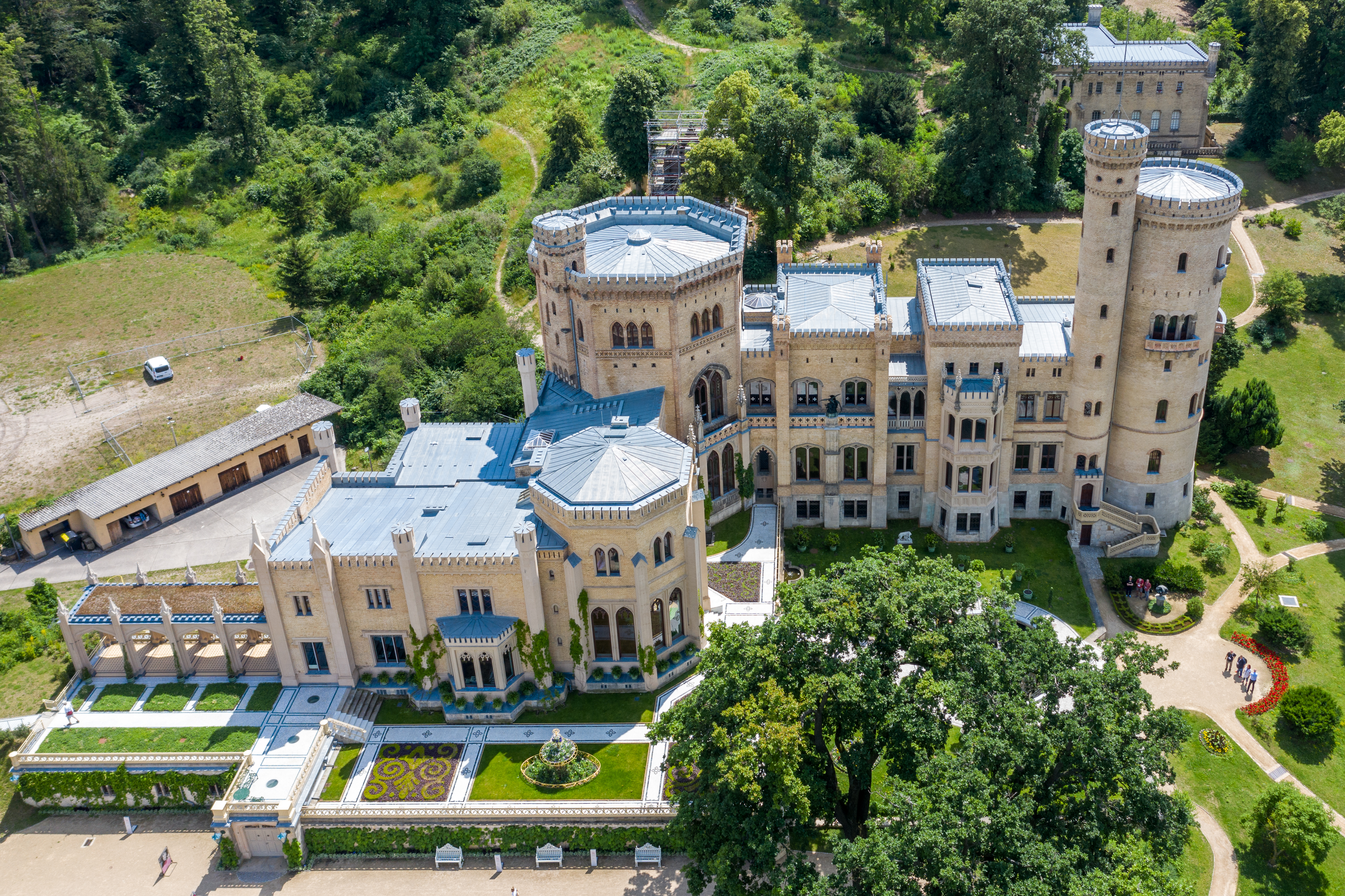 Schloss Babelsberg - Luftaufnahme